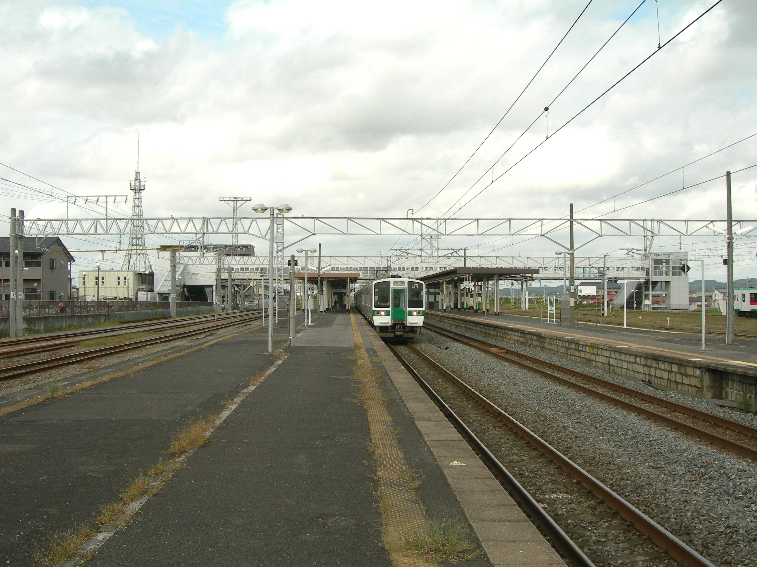 JR東日本 小牛田駅ホーム